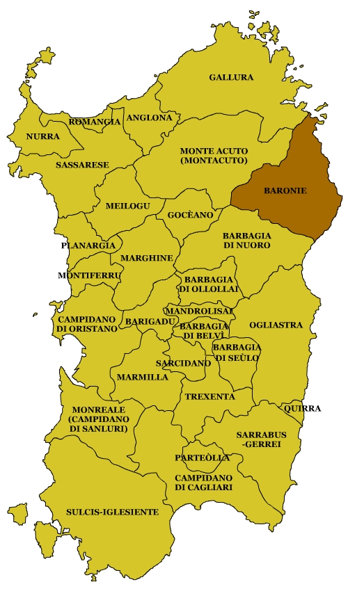 Sardinian Subregions